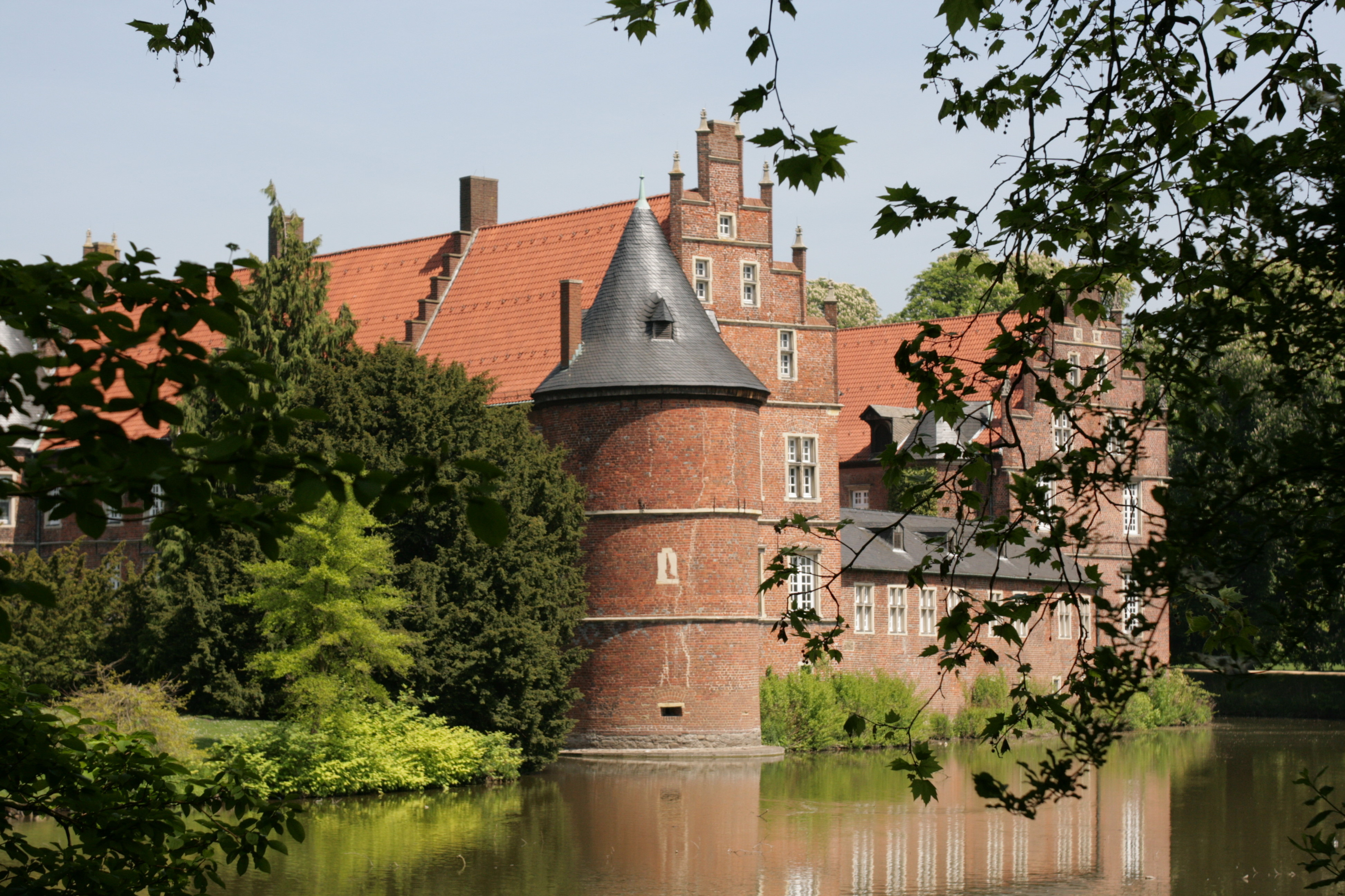 Schloss Herten, Im Schlosspark 12 in Herten